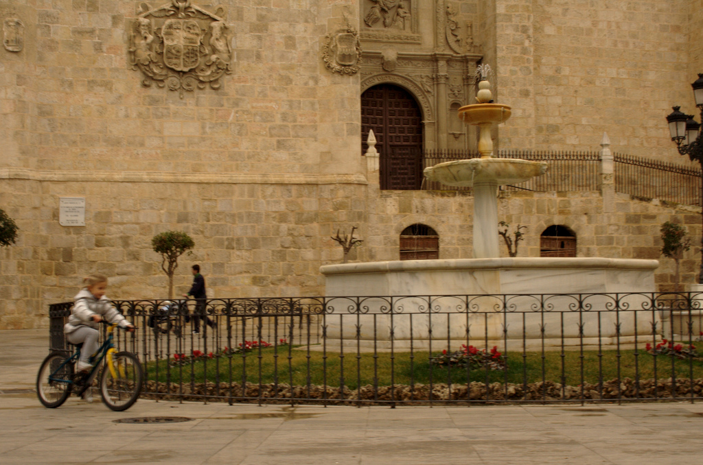 Plaza Mayor de Baza, en Granada (España), con la fuente y la Iglesia de la Encarnación al fondo.